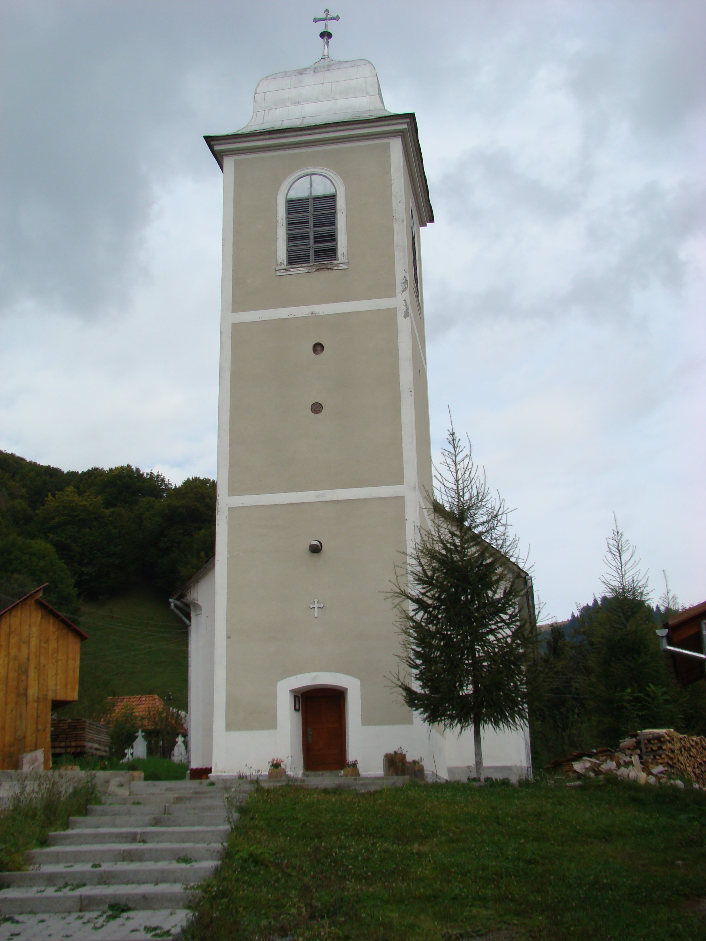 Biserica din Bucium-Șasa